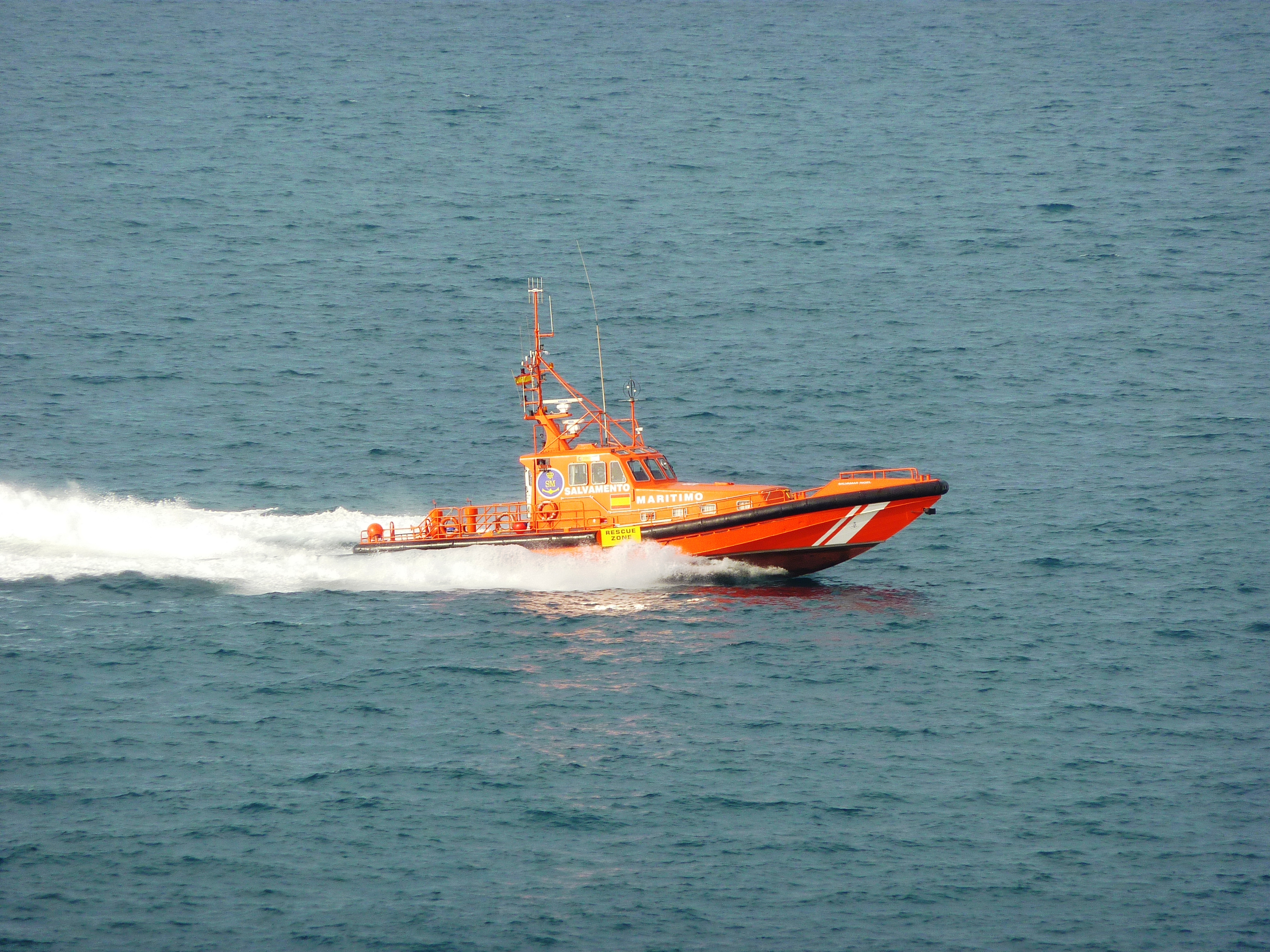 Buque de la Sociedad de Salvamento y Seguridad Marítima clase Salvamar "Rigel".